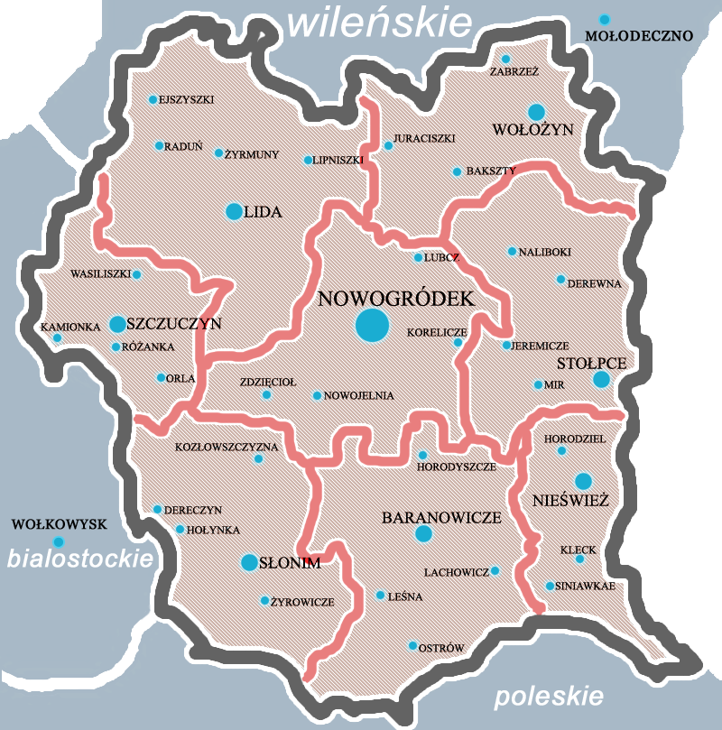 Podział administracyjny województwa nowogródzkiego, 1937 r.